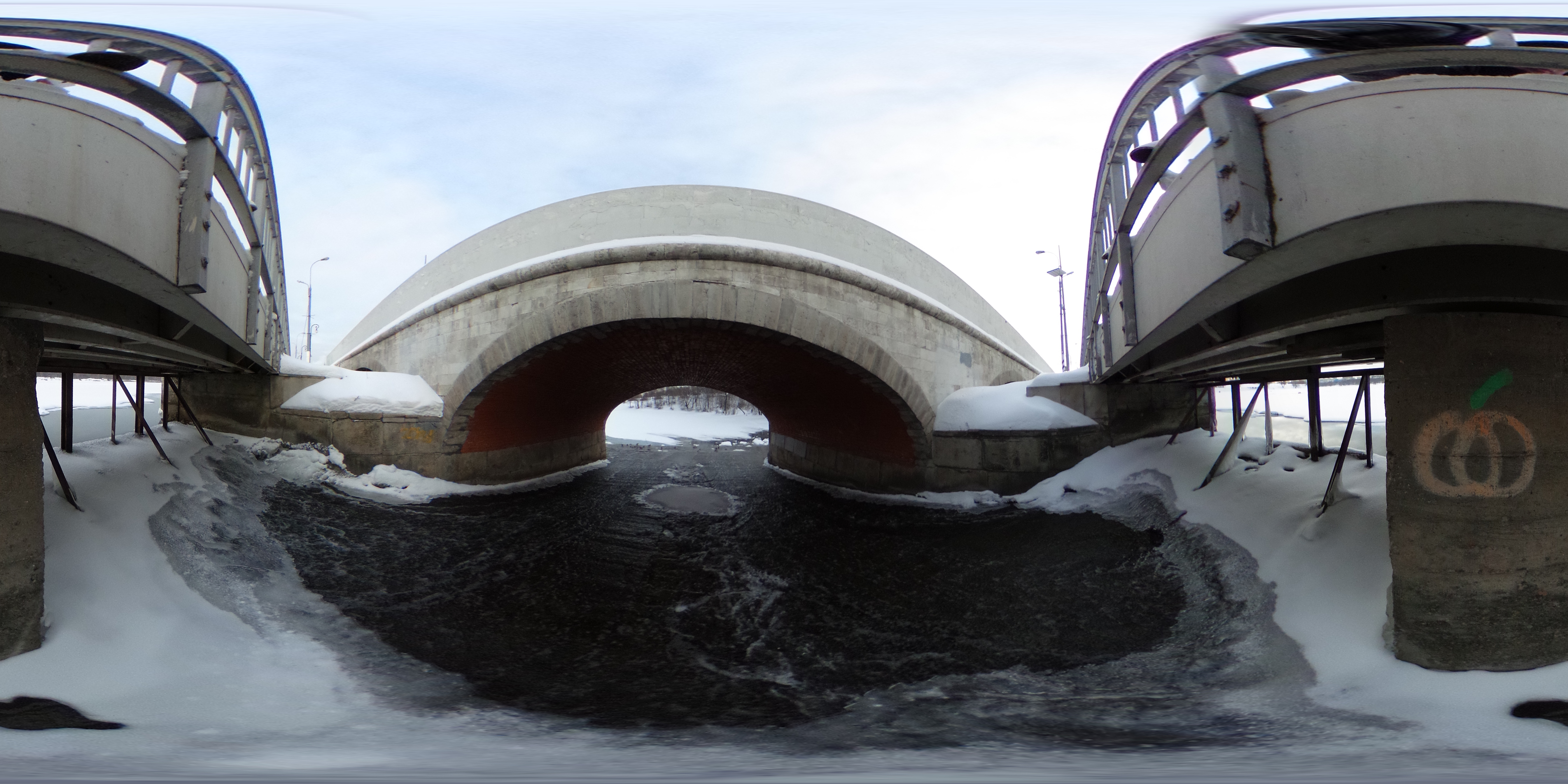 Камера прикреплена к палке для селфи, и перевёрнута. Наклон скорректирован в nona самописным скриптом по данным с акселерометра.